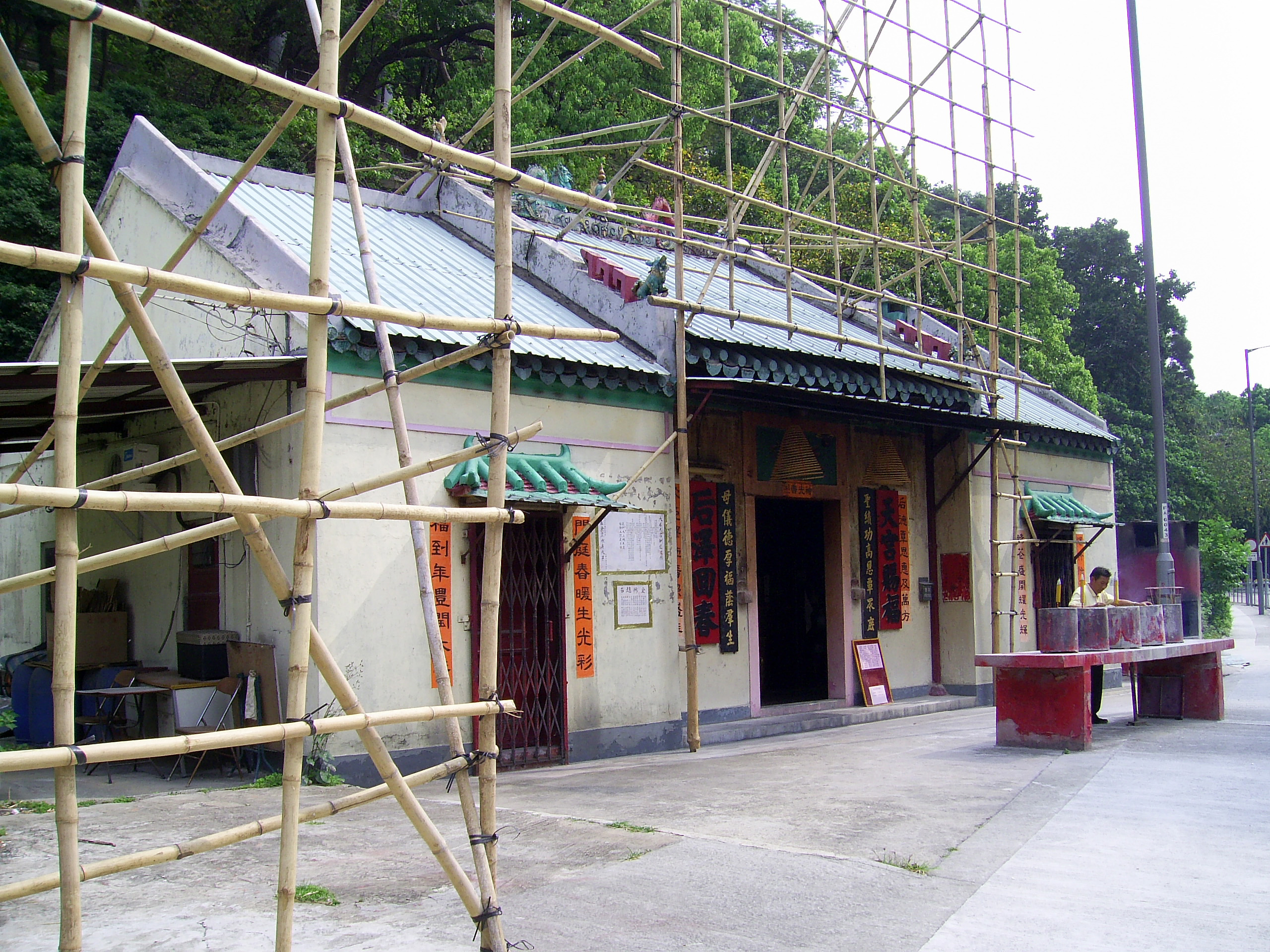 中文（香港）: 葵涌天后廟